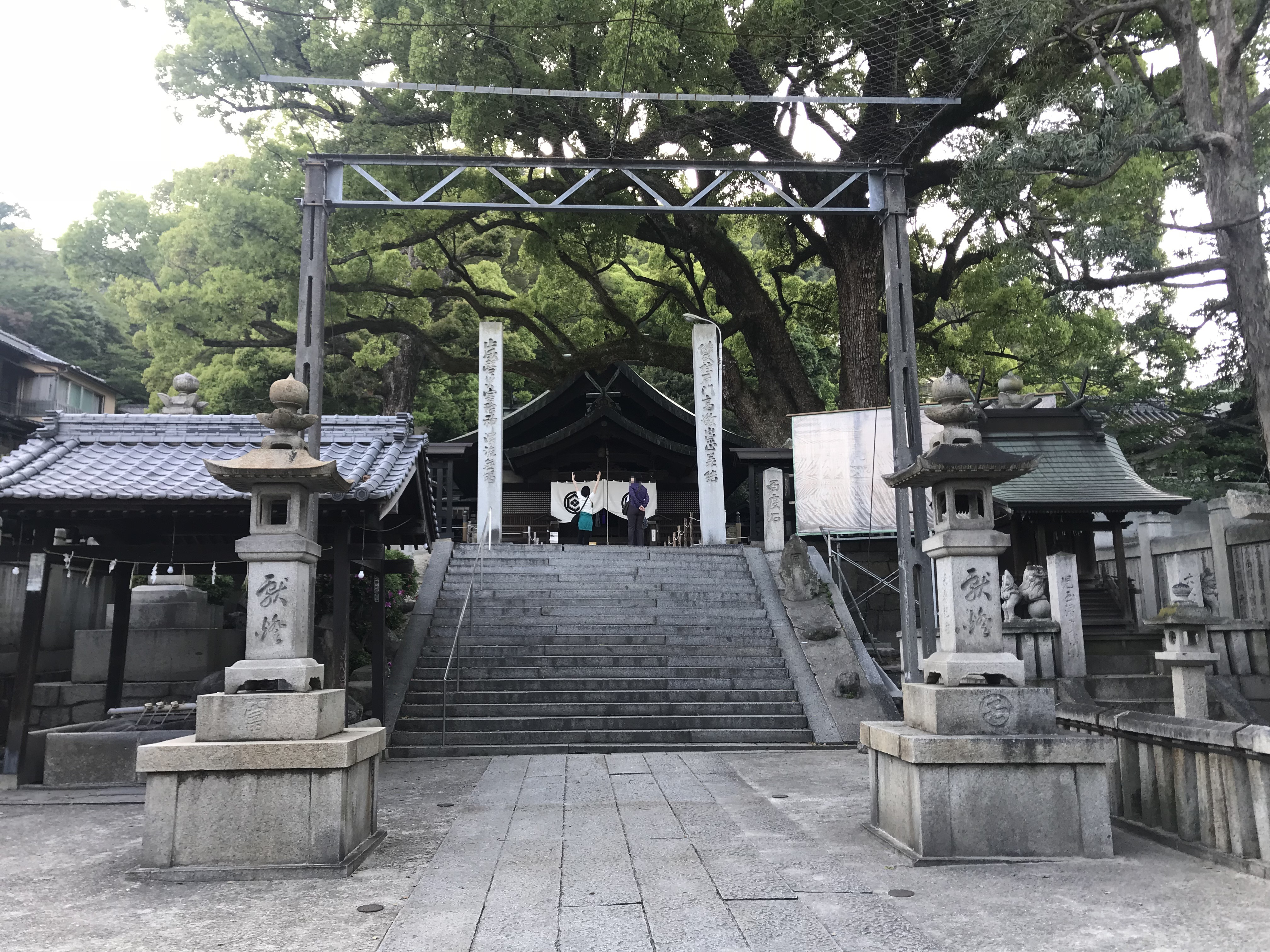 艮神社の拝殿。右側は塞神社